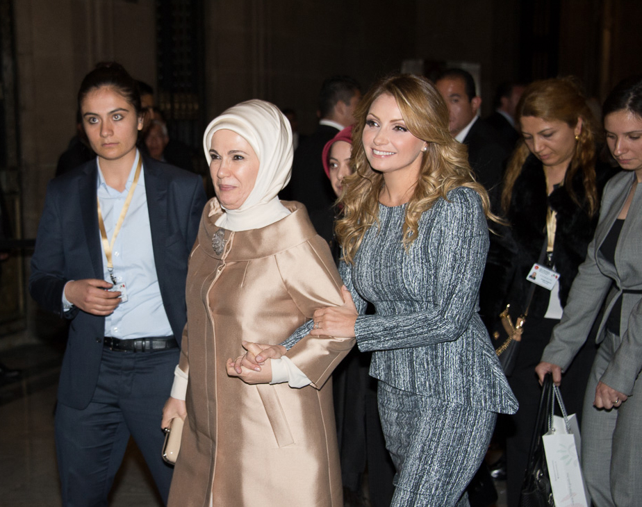 Visita de Estado del señor Recep Tayyip Erdogan, Presidente de la República de Turquía. Palacio Nacional, Ciudad de México. 12 de febrero de 2015. State visit of Recep Tayyip Erdogan, President of the Republic of Turkey. Mexico City. February 12, 2015.